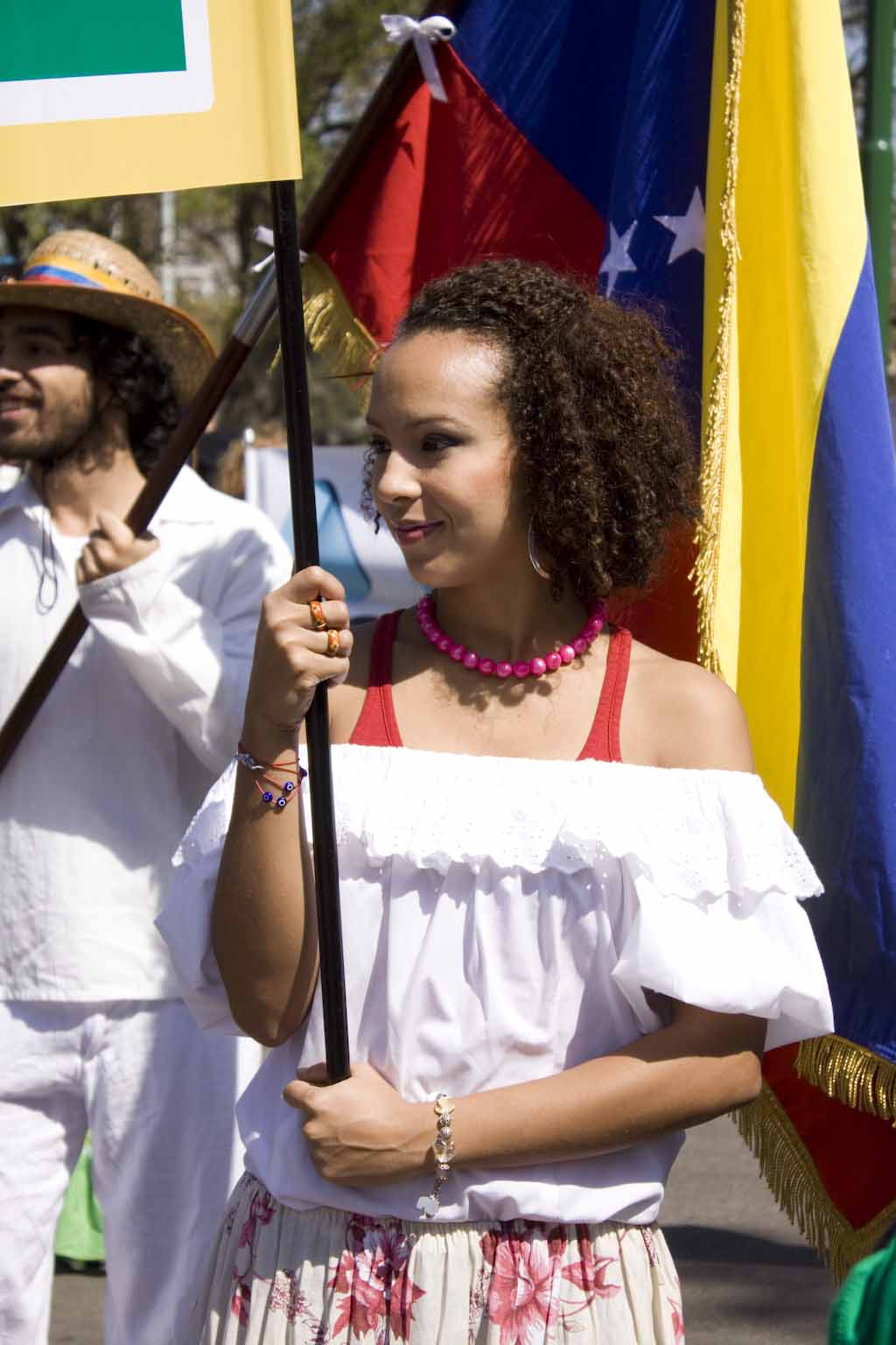 Dia del inmigrante 041